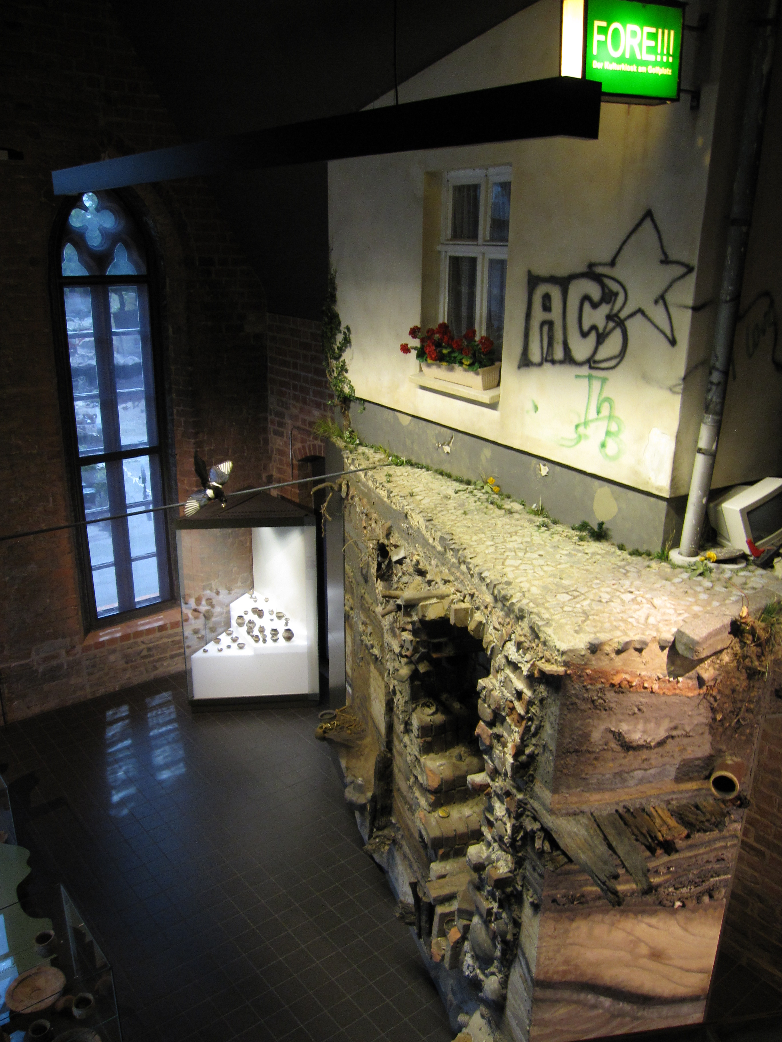 Das "Stratorama" ist ein 4x6 m großes Erdschichtenmodell aus Styropor und Styrodur. Es zeigt einen idealen Grabungsschnitt und stellt somit Befunde der verschiedensten Erdschichten dar.